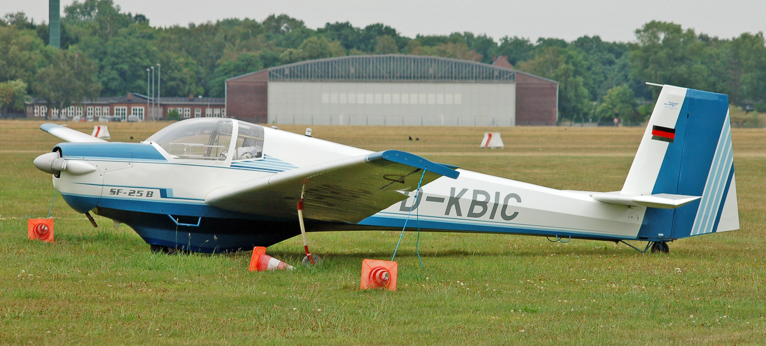 Scheibe SF 25 B (D-KBIC) auf dem Flugplatz Uetersen